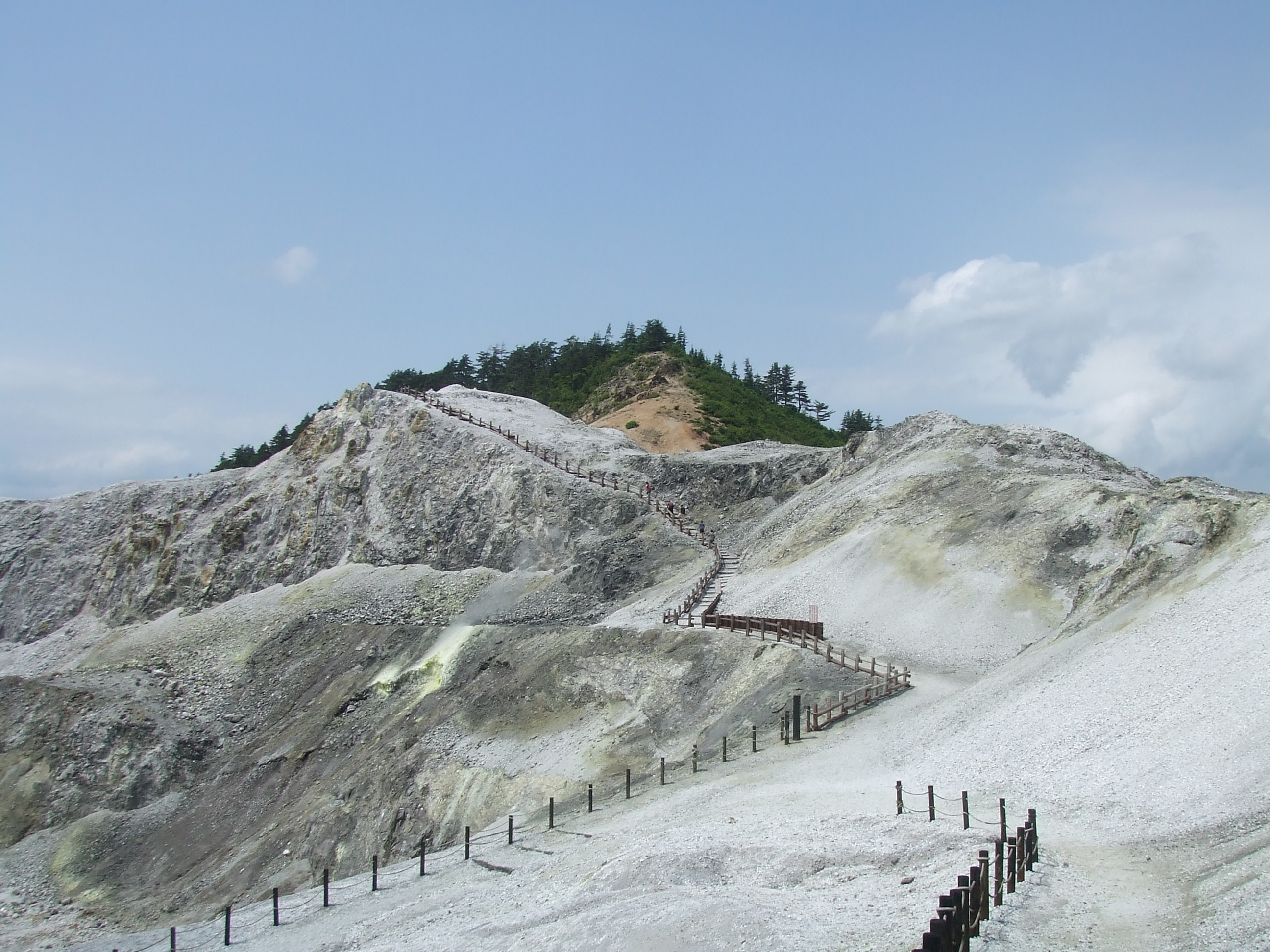 川原毛地獄